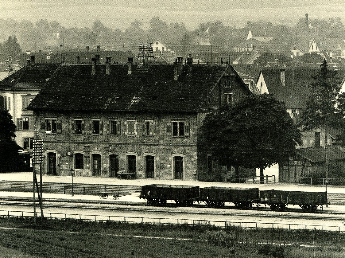 Bahnhofsgebäude und Güterwagen in Metzingen.